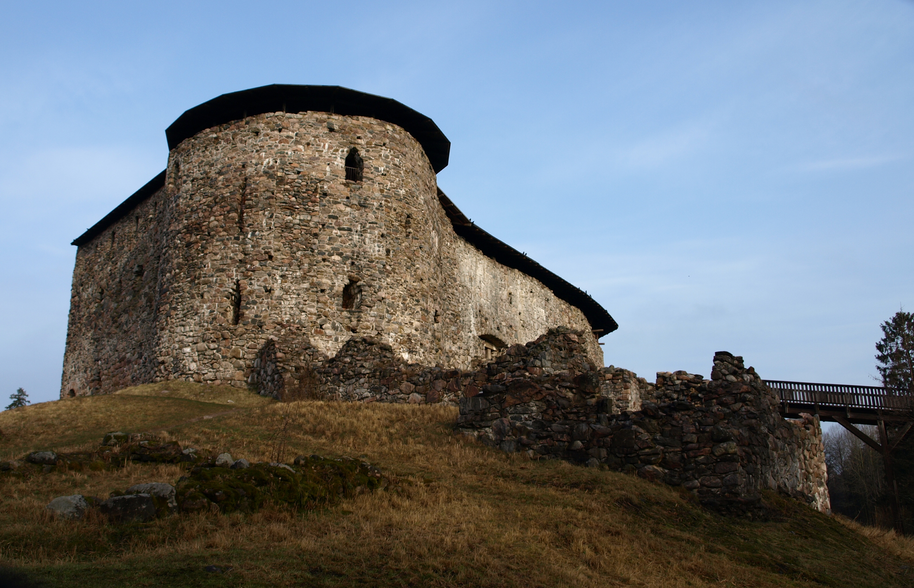 Die Burgruine Raseborg bei Snappertuna (Südfinnland)